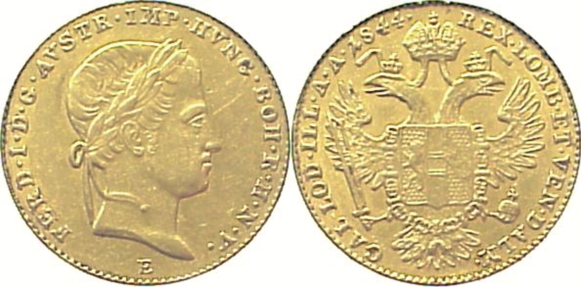 Dukáty darované eacv